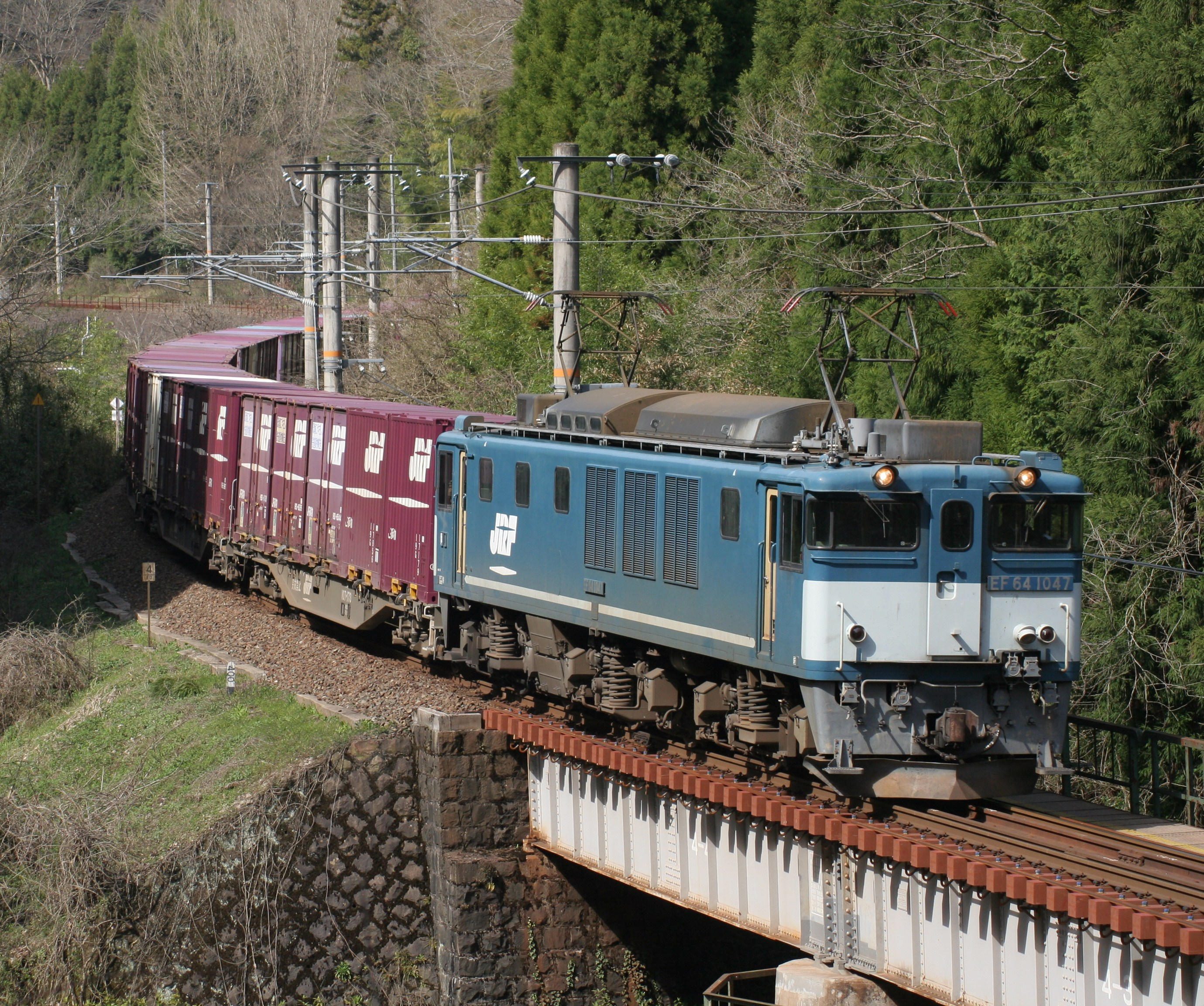 国鉄EF64形電気機関車1047号機 伯備線、足立 - 新郷 3084レ